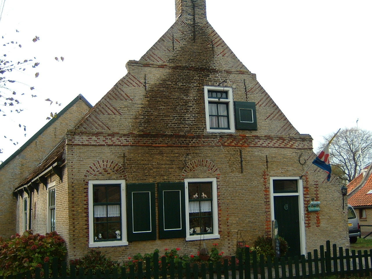 Kapiteinshuis in Nes, Ameland.